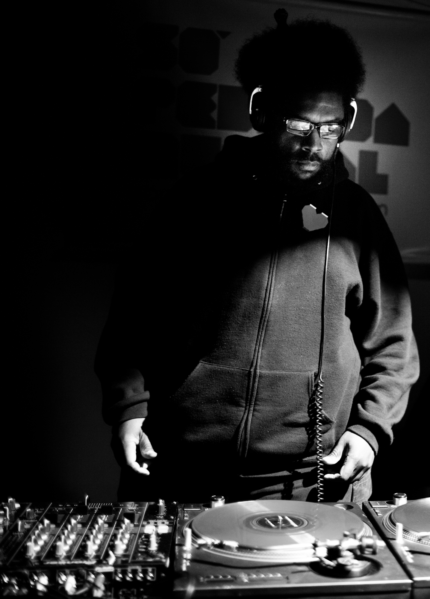 Questlove at "Festa de 5 anos do Só Pedrada Musical" in São Paulo, Brazil